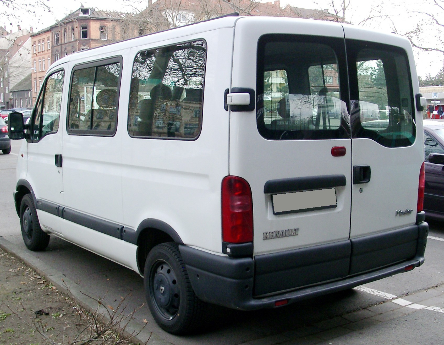 Renault Master, im Hintergrund ist das abgebrannte Wohnhaus des Wohnhausbrandes in Ludwigshafen am Rhein zu sehen